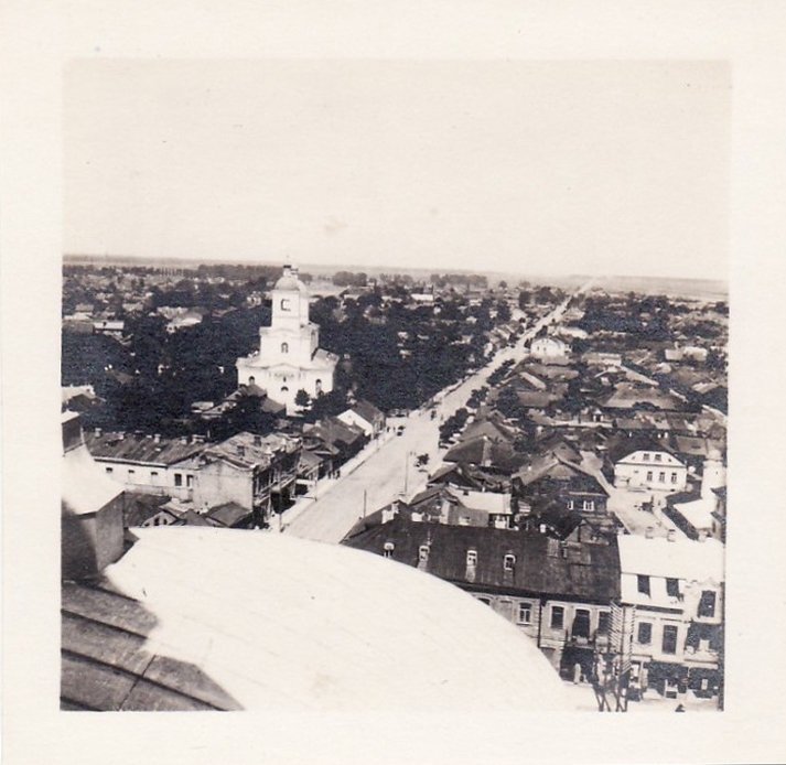 Беларуская (тарашкевіца): Пінск (Pinsk), вуліца Лагішынская (vulica Łahišynskaja)